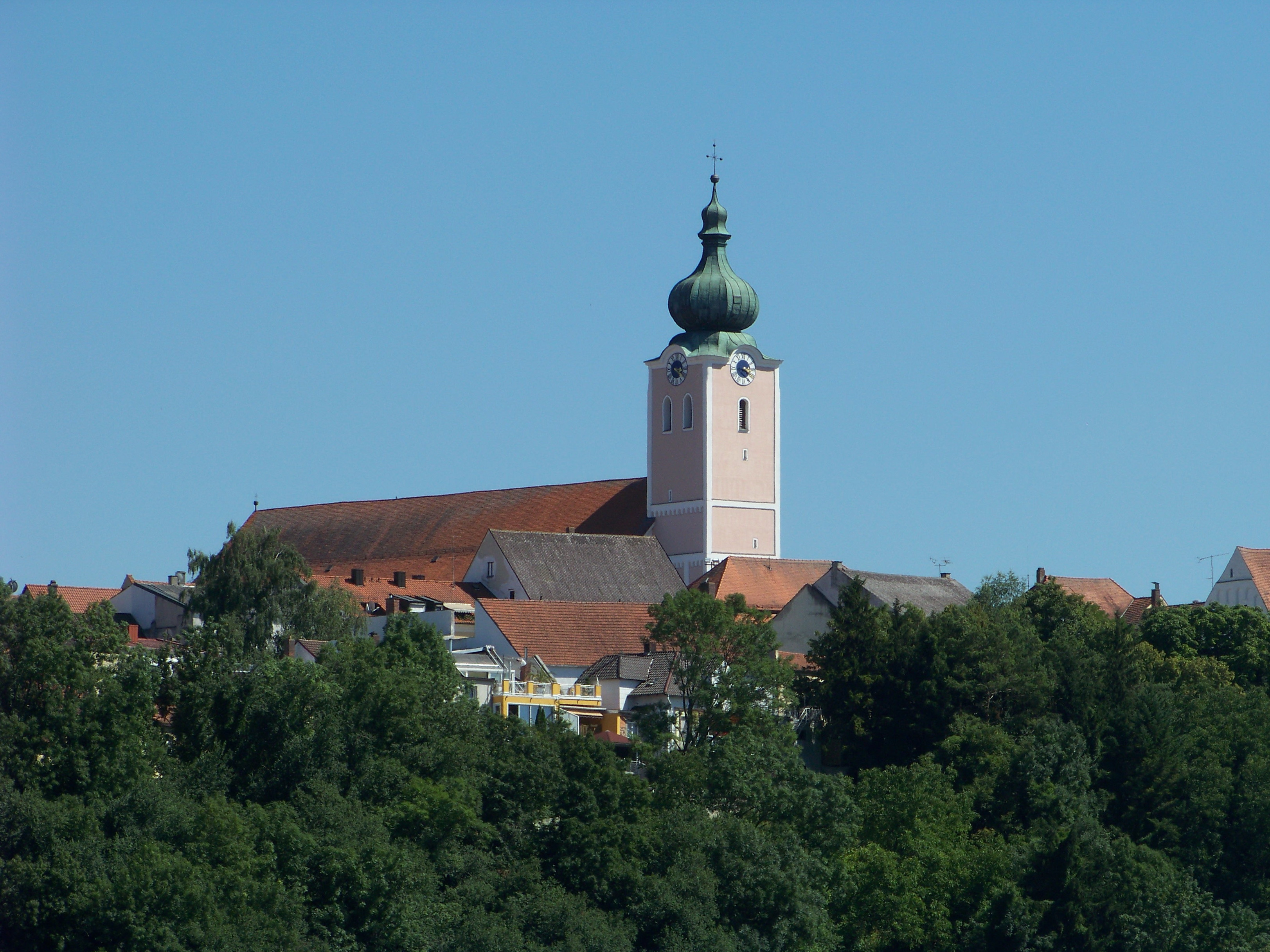 Landau an der Isar. Oberer Stadtplatz 15. Katholische Stadtpfarrkirche Mariä Himmelfahrt. Barocke Wandpfeilerkirche mit Westturm, nördlich barocker Ölberganbau, von Dominico Mazio (Dominikus Magzin) ab 1713 erbaut, Turmunterbau mittelalterlich; mit Ausstattung; Kreuzgruppe, 19. Jahrhundert; an der Südseite.